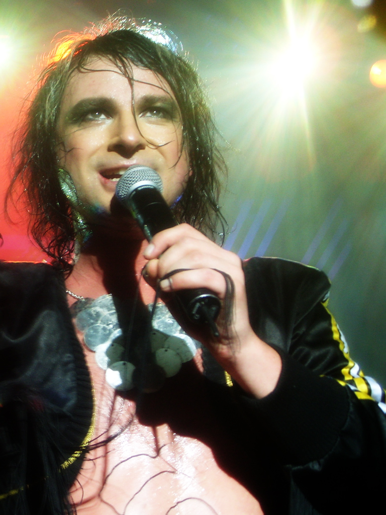 Ola Salo, från ett uppträdande i Helsingfors 2007.